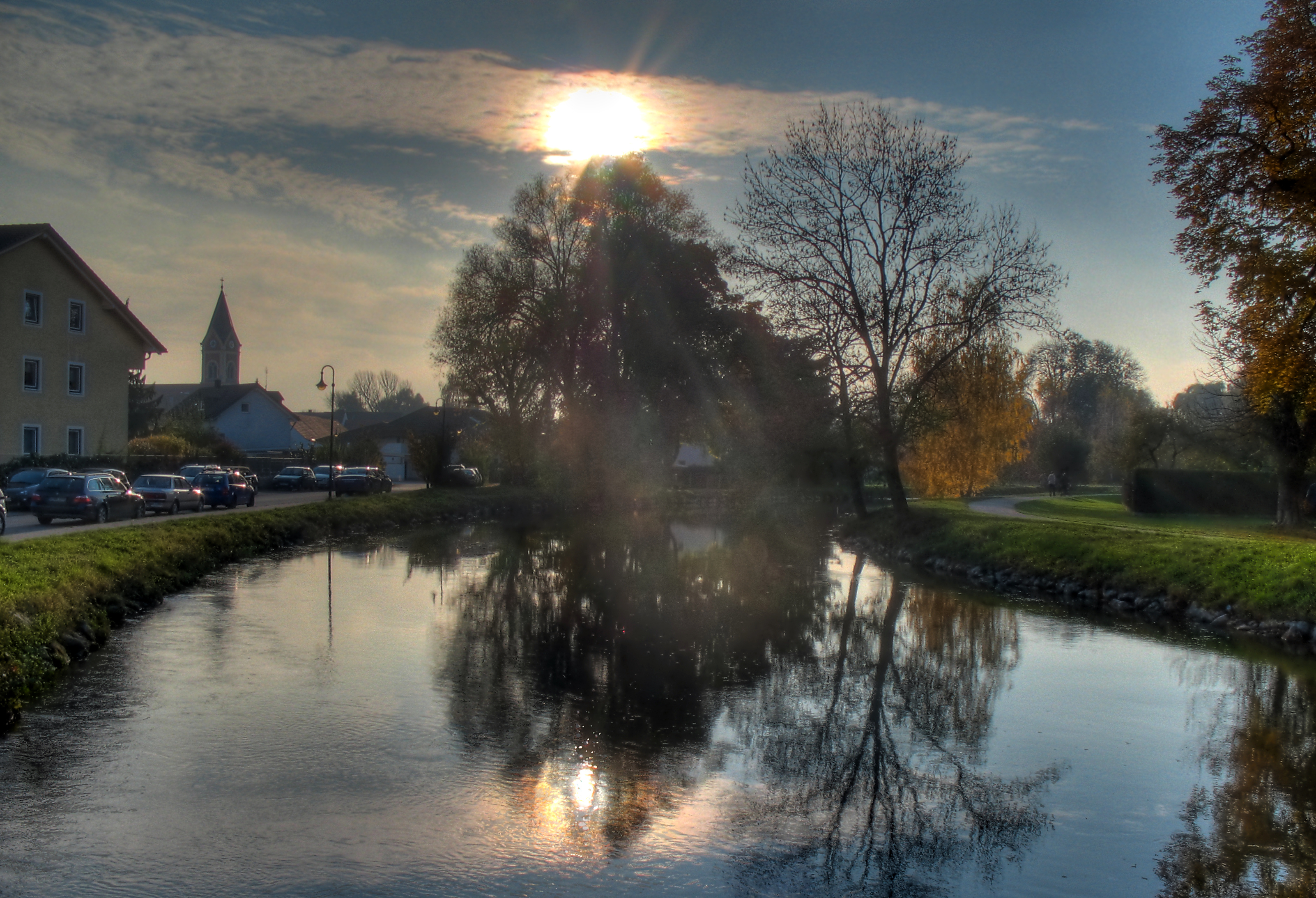 Deutschland, Bayern, Landkreis Fürstenfeldbruck, Olching, Mühlbach (Amper), tonemapped HDR-Aufnahme